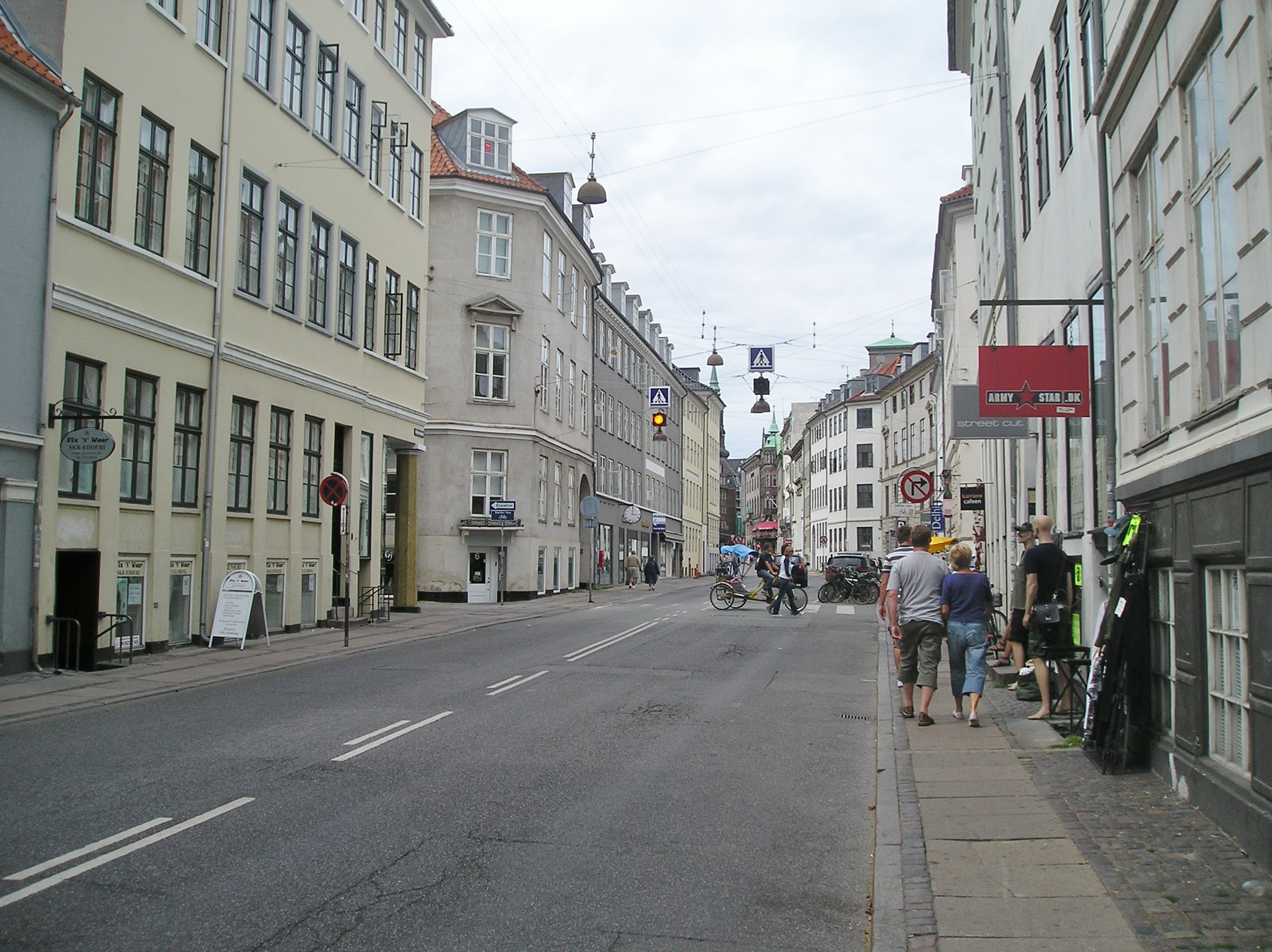 The street Rådhusstræde in Copenhagen.